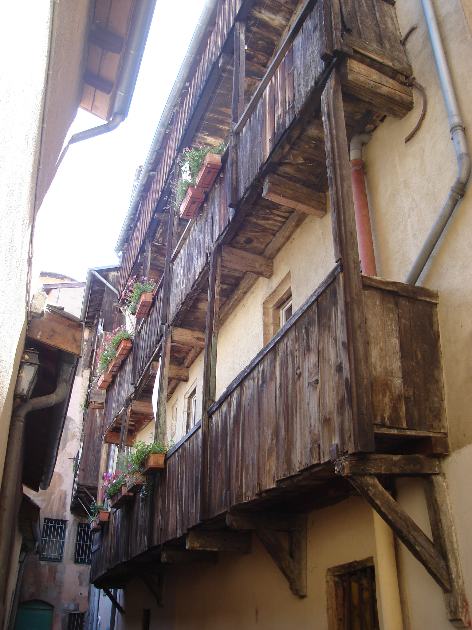 Pans en bois de l'impasse Turquet, Lyon